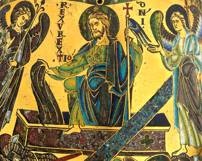 Наплечник Андрея Боголюбского